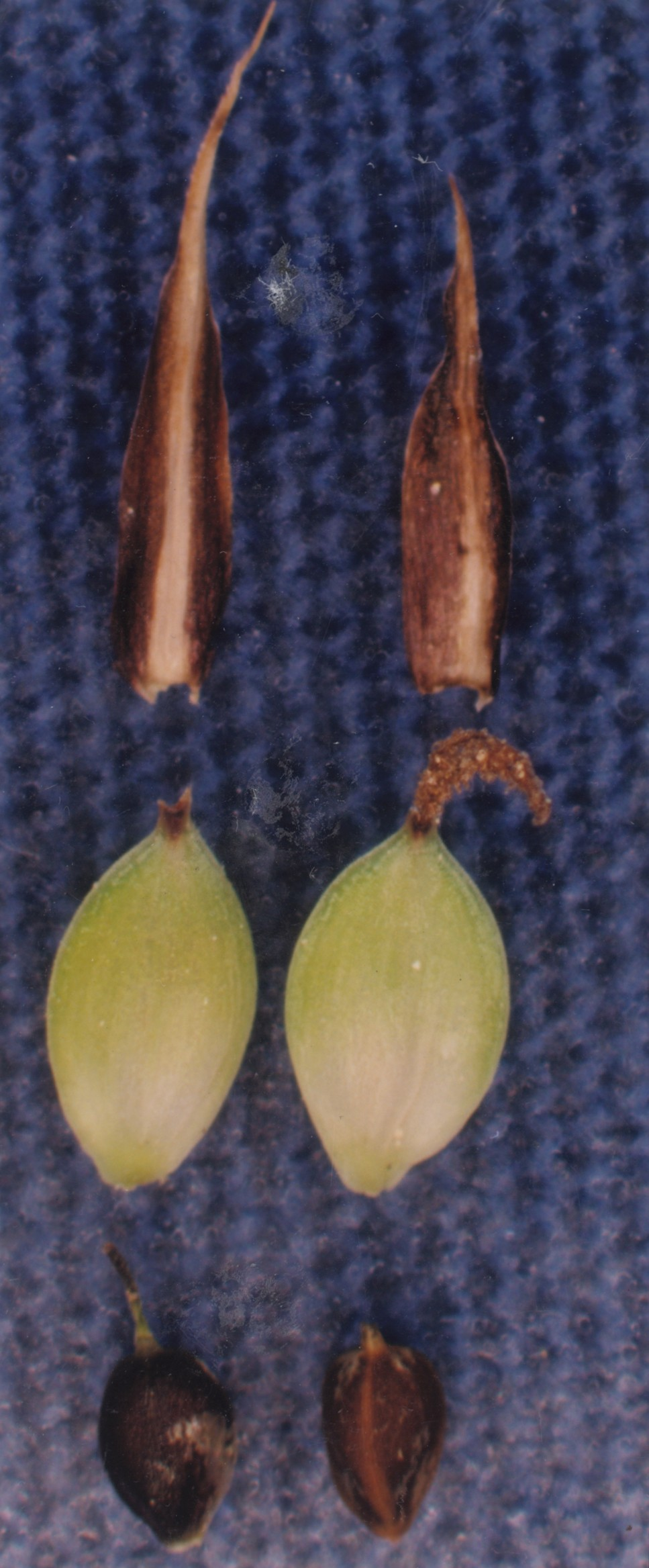 Carex buxbaumii, knotszegge This image is not copyrighted and may be freely used for any purpose. Please credit the artist, original publication if applicable, and the USDA-NRCS PLANTS Database. The following format is suggested and will be appreciated: USDA-NRCS PLANTS Database / Hurd, E.G., N.L. Shaw, J. Mastrogiuseppe, L.C. Smithman, and S. Goodrich. 1998. Field guide to Intermountain sedges. General Technical Report RMS-GTR-10. USDA Forest Service, RMRS, Ogden. If you cite PLANTS in a bibliography, please use this citation: USDA, NRCS. 2008. The PLANTS Database ( 12 September 2008). National Plant Data Center, Baton Rouge, LA 70874-4490 USA.